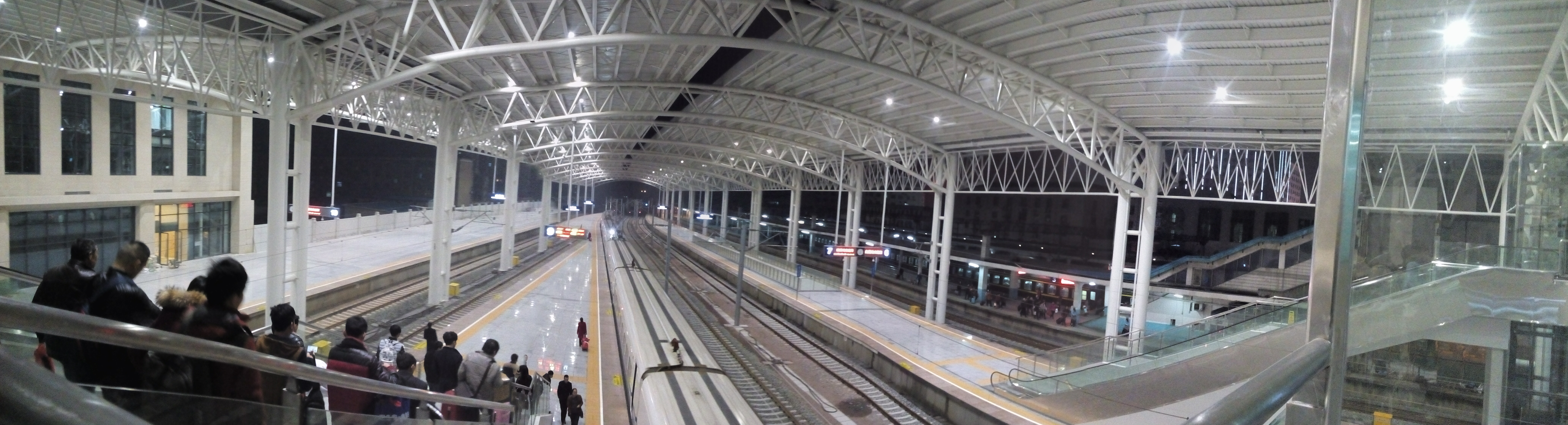 南站新的8、9站台南侧朝向